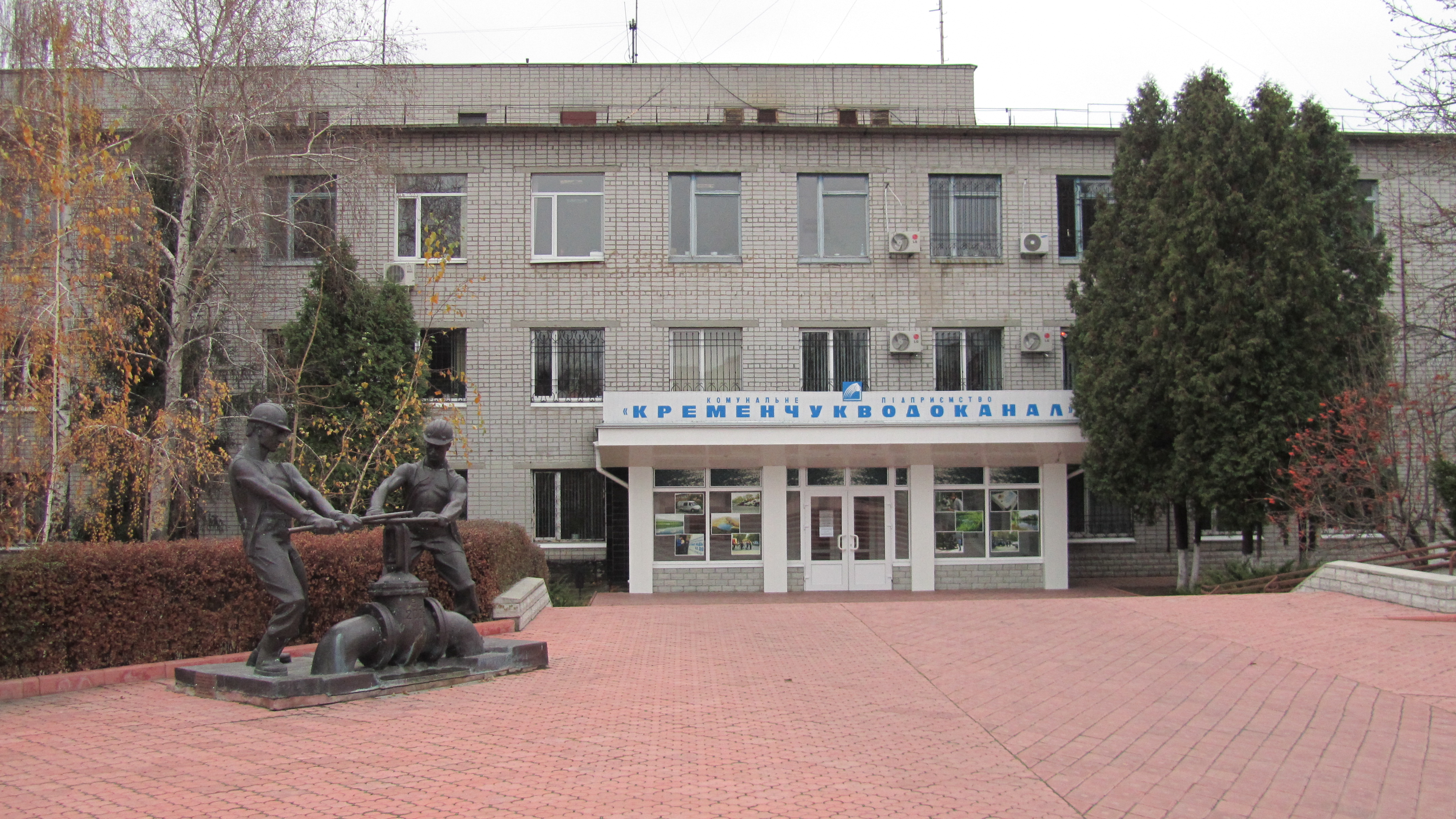 Центральна будівля Комунального підприємства "Кременчуцький водоканал"